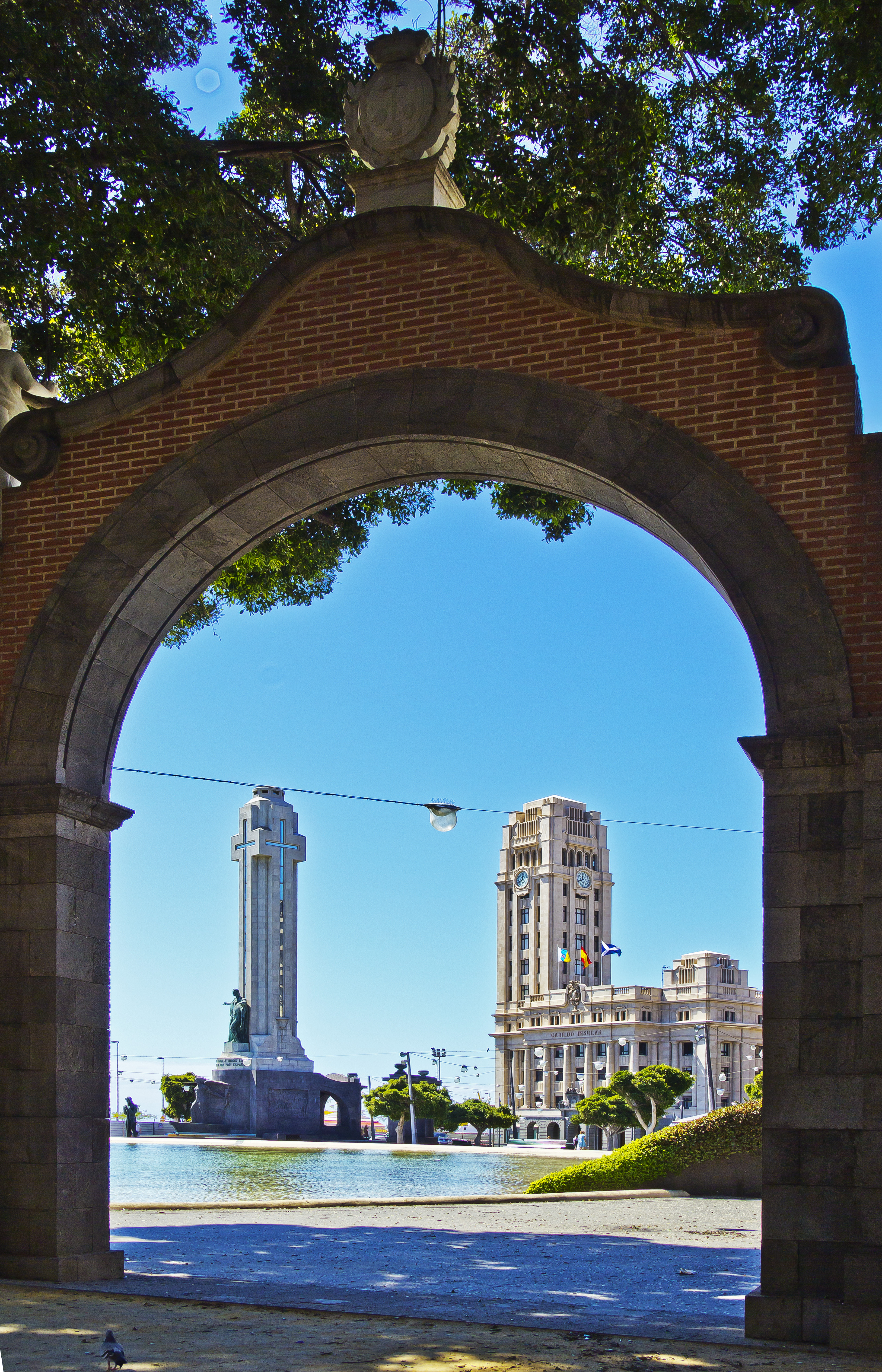 Blick durch einen der Torbögen des Eingangs der Alameda del Duque de Santa Elena auf die Plaza de España in Santa Cruz de Tenerife